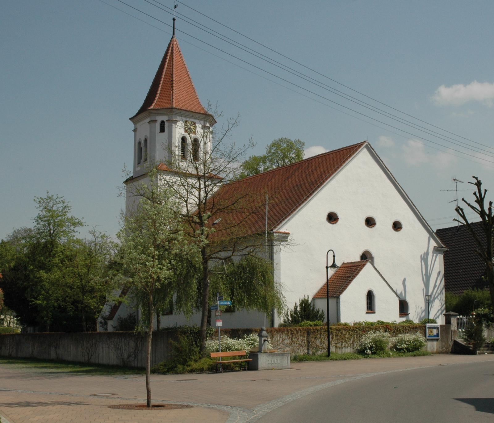 Kirche St. Nikolaus in Bächingen an der Brenz. Fotografie, aufgenommen von Johannes Bae., 2006.